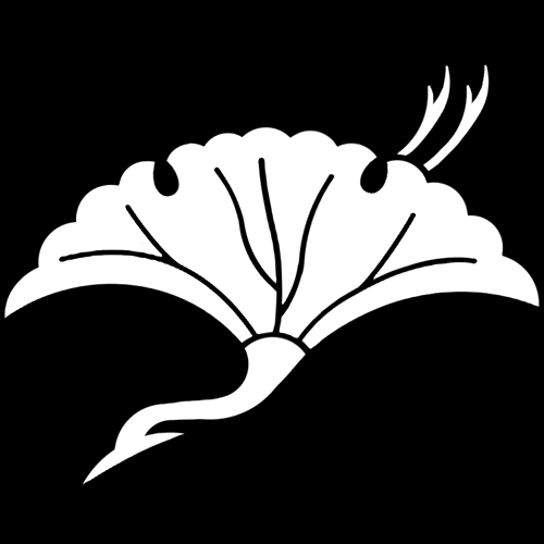 「銀杏鶴」紋（染抜）